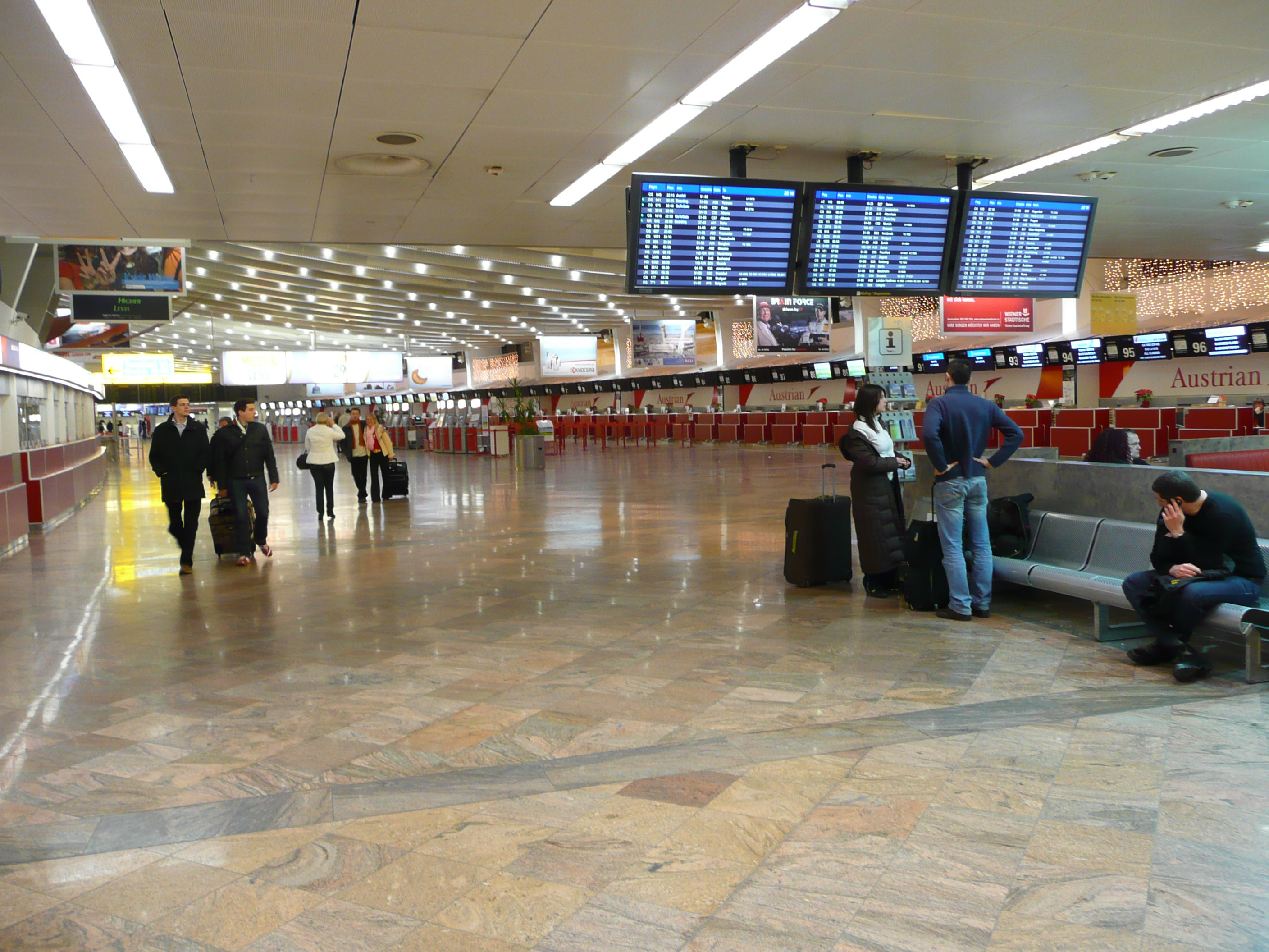 Terminal 1 of Vienna International Airport, shot on December 27th, 2007